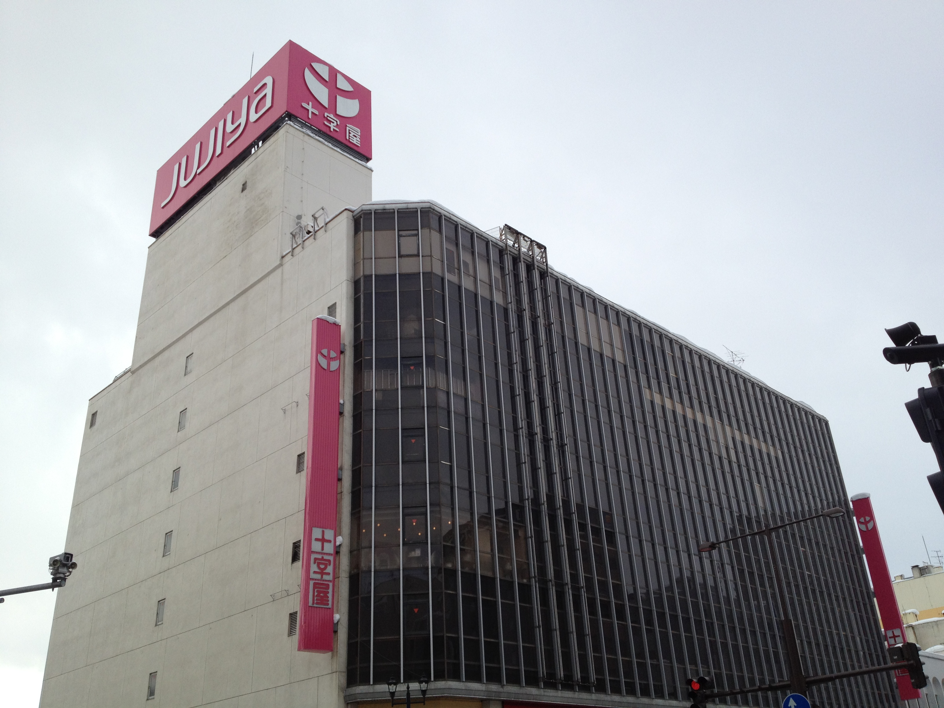 山形市幸町に有る中合十字屋山形店